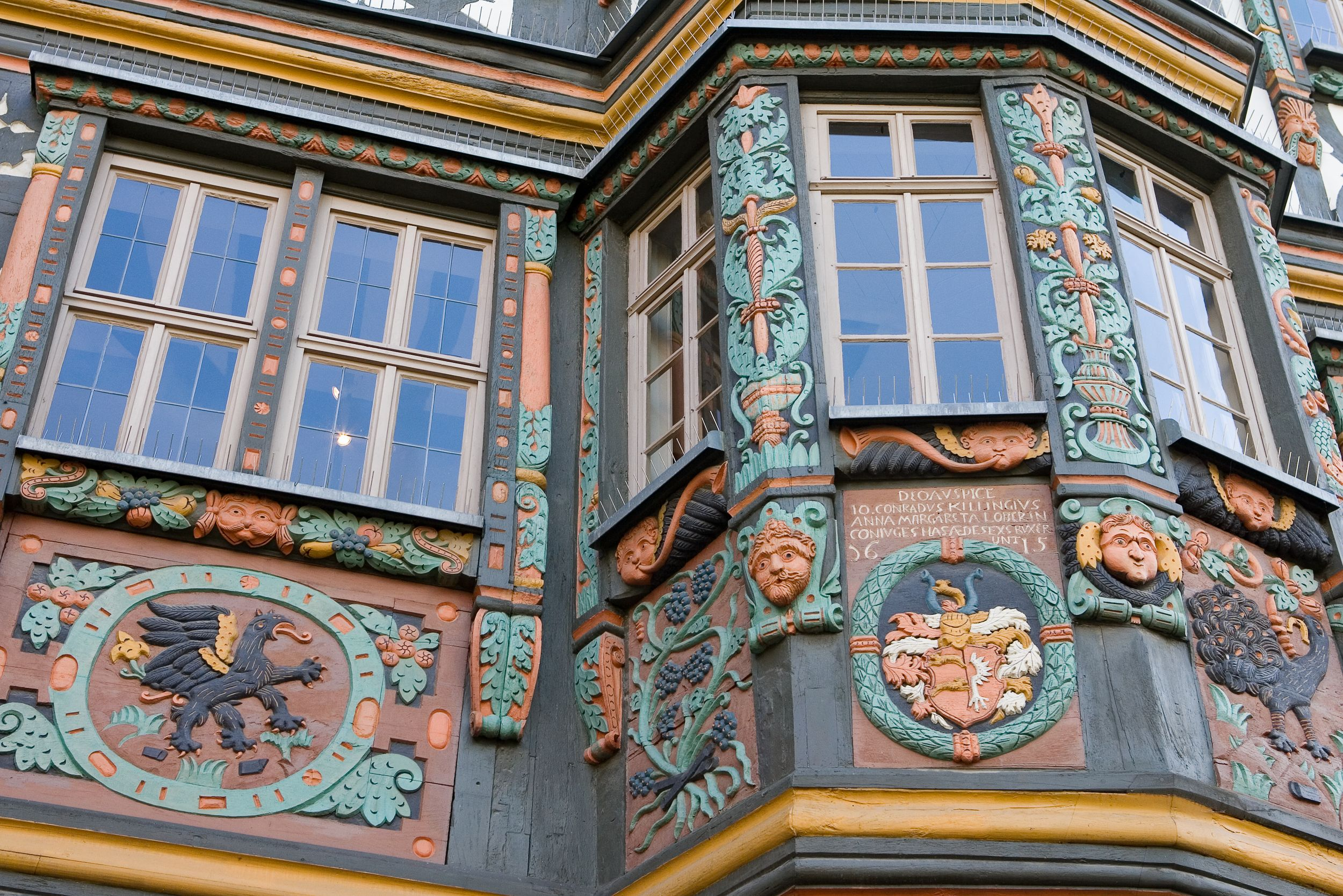 Detail der Fassade des Killingerhauses in Idstein. Selber fotografiert im September 2007, Doppellizensierung GFDL & CC-BY-SA 2.5.